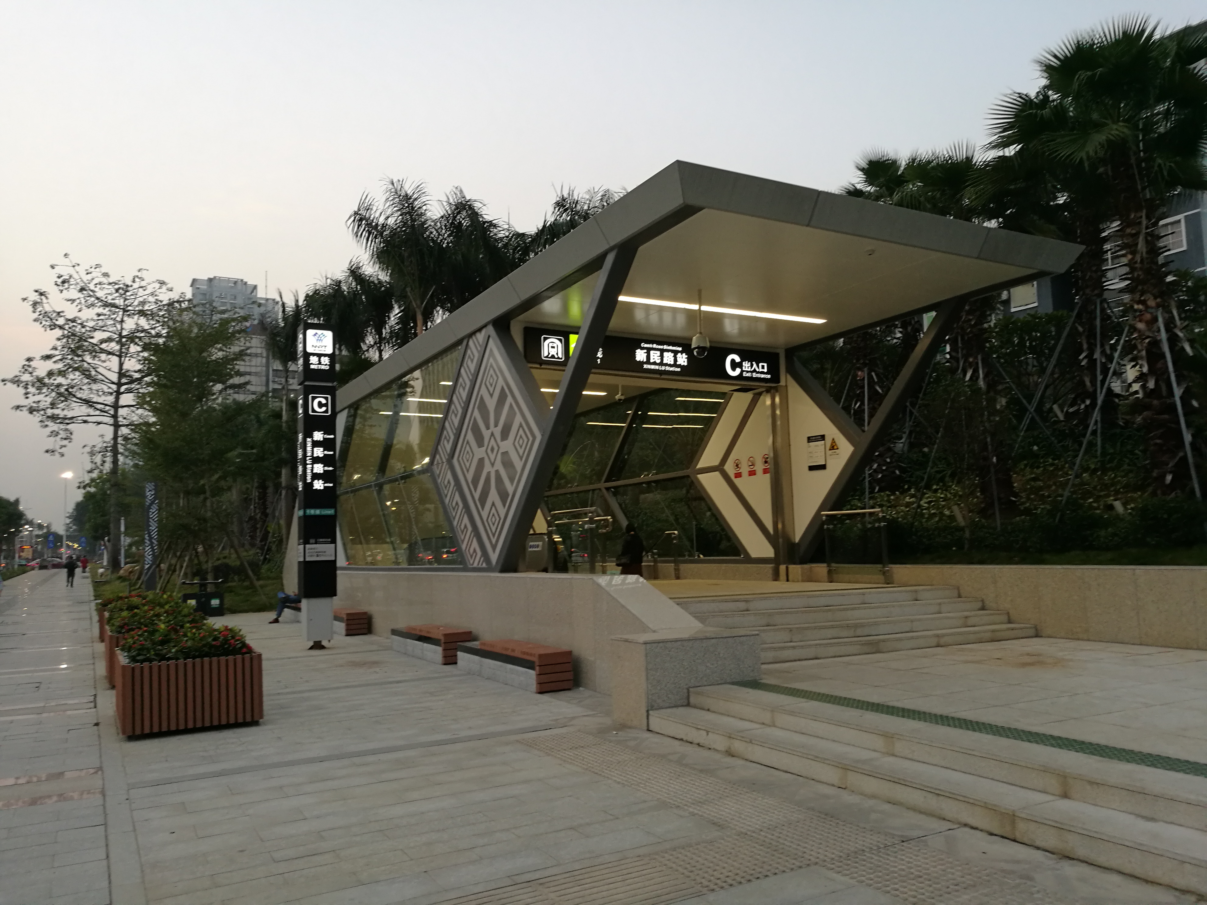 南宁轨道交通新民路站